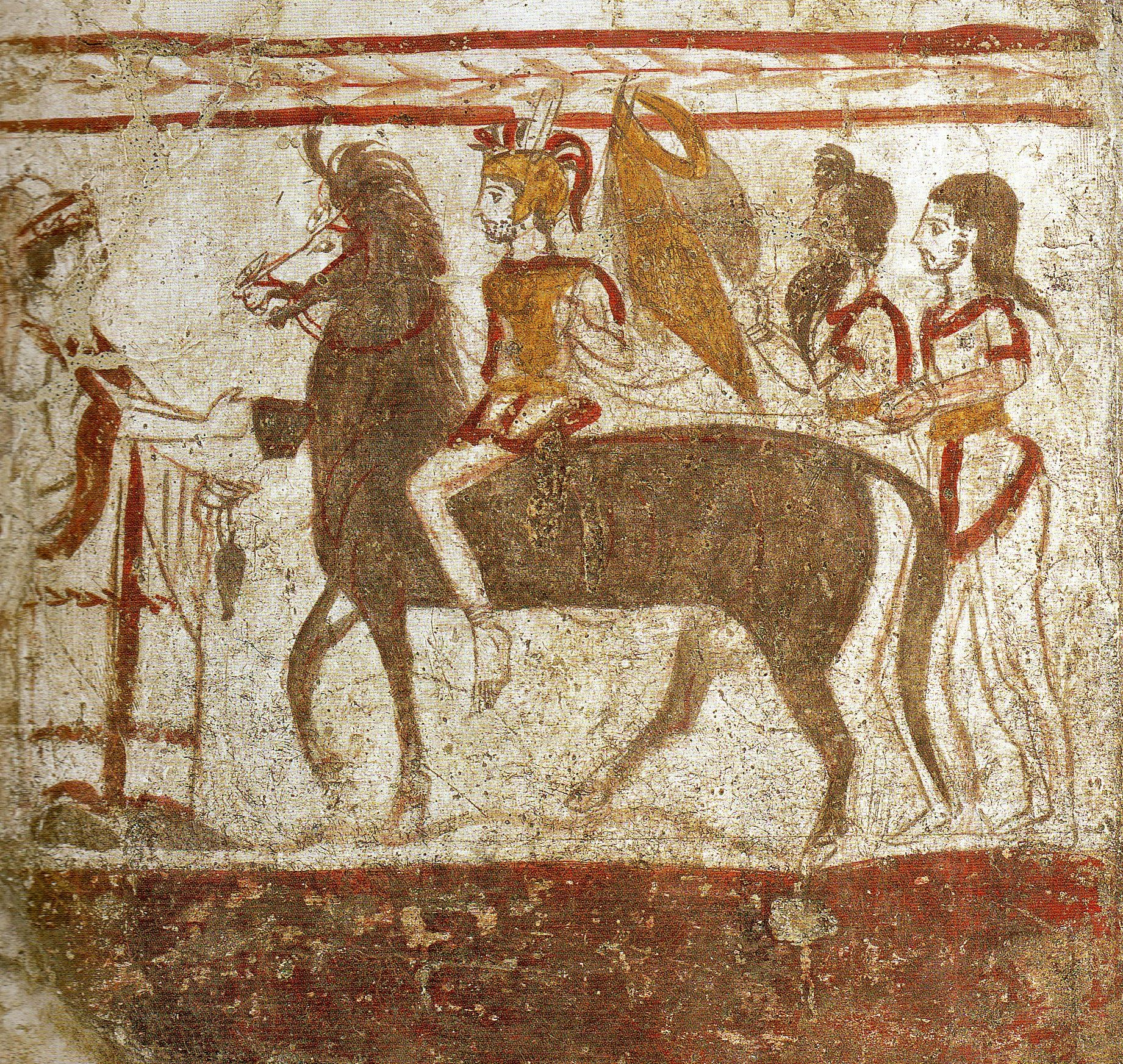 Paestum, Grab der Granatäpfel. Schmalseite:Heimkehrender Ritter